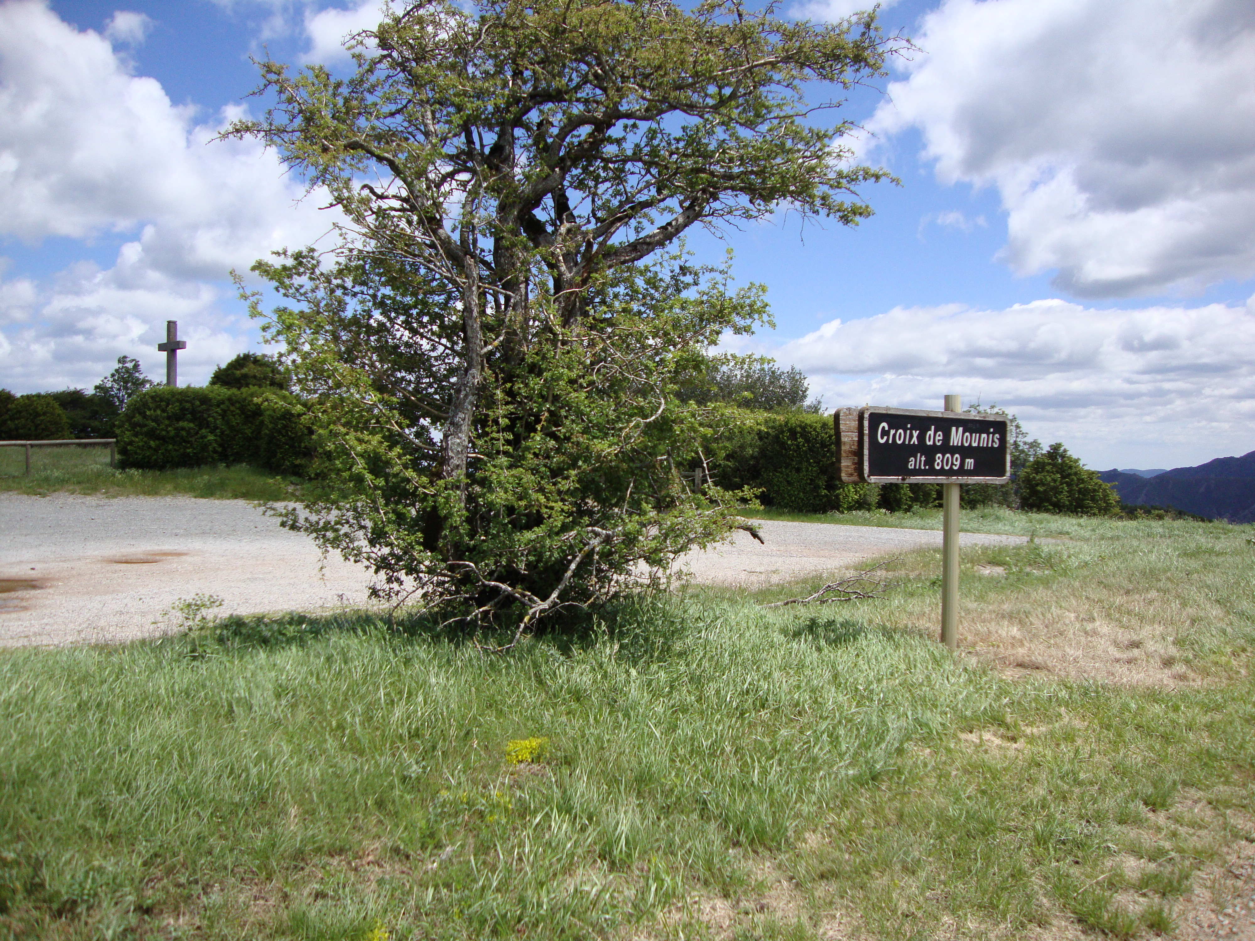 Castanet-le-Haut (Hérault, Languedoc-Roussillon, France) - col de la Croix de Mounis.